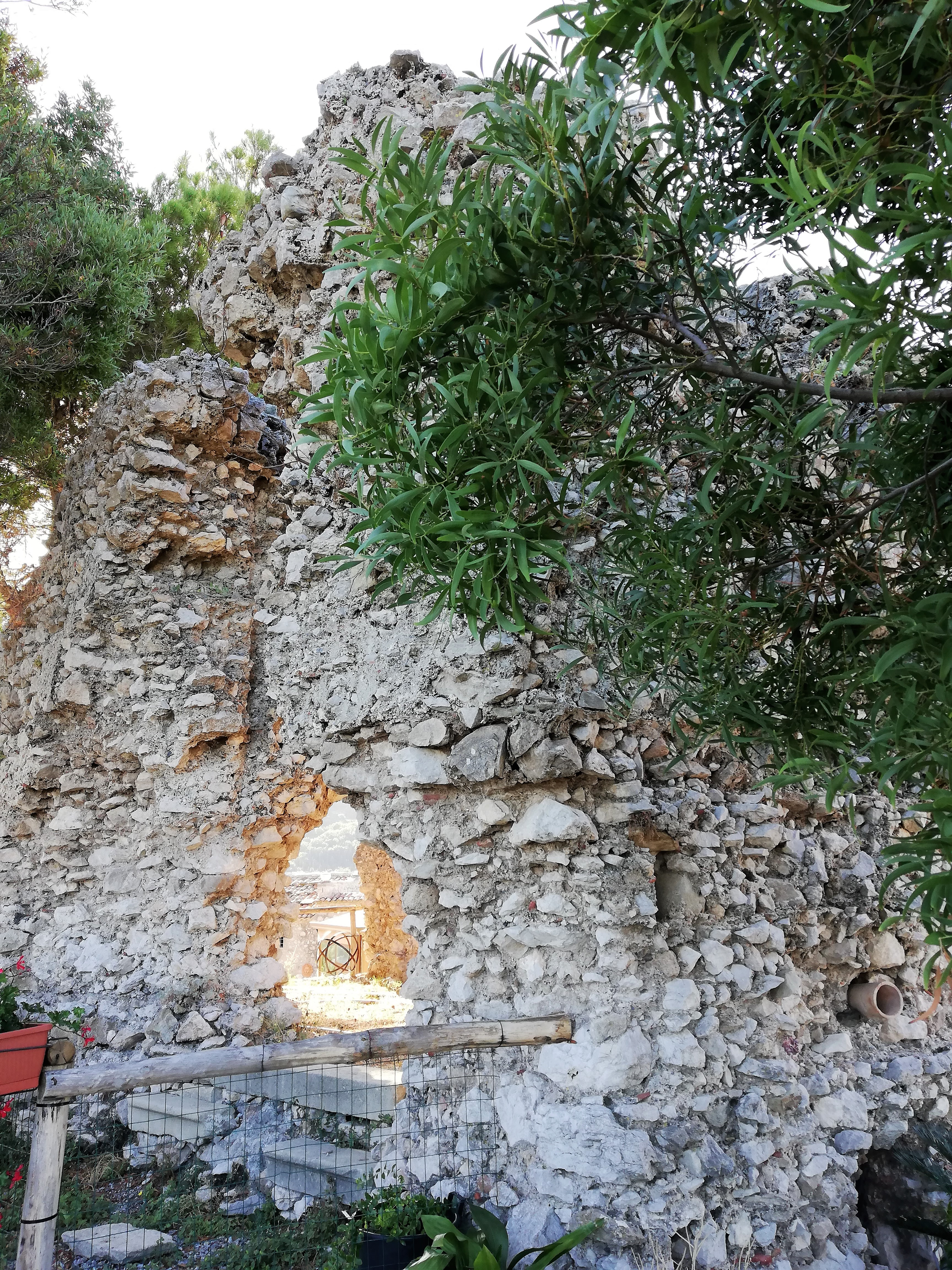 Prospetto nord - occidentale.